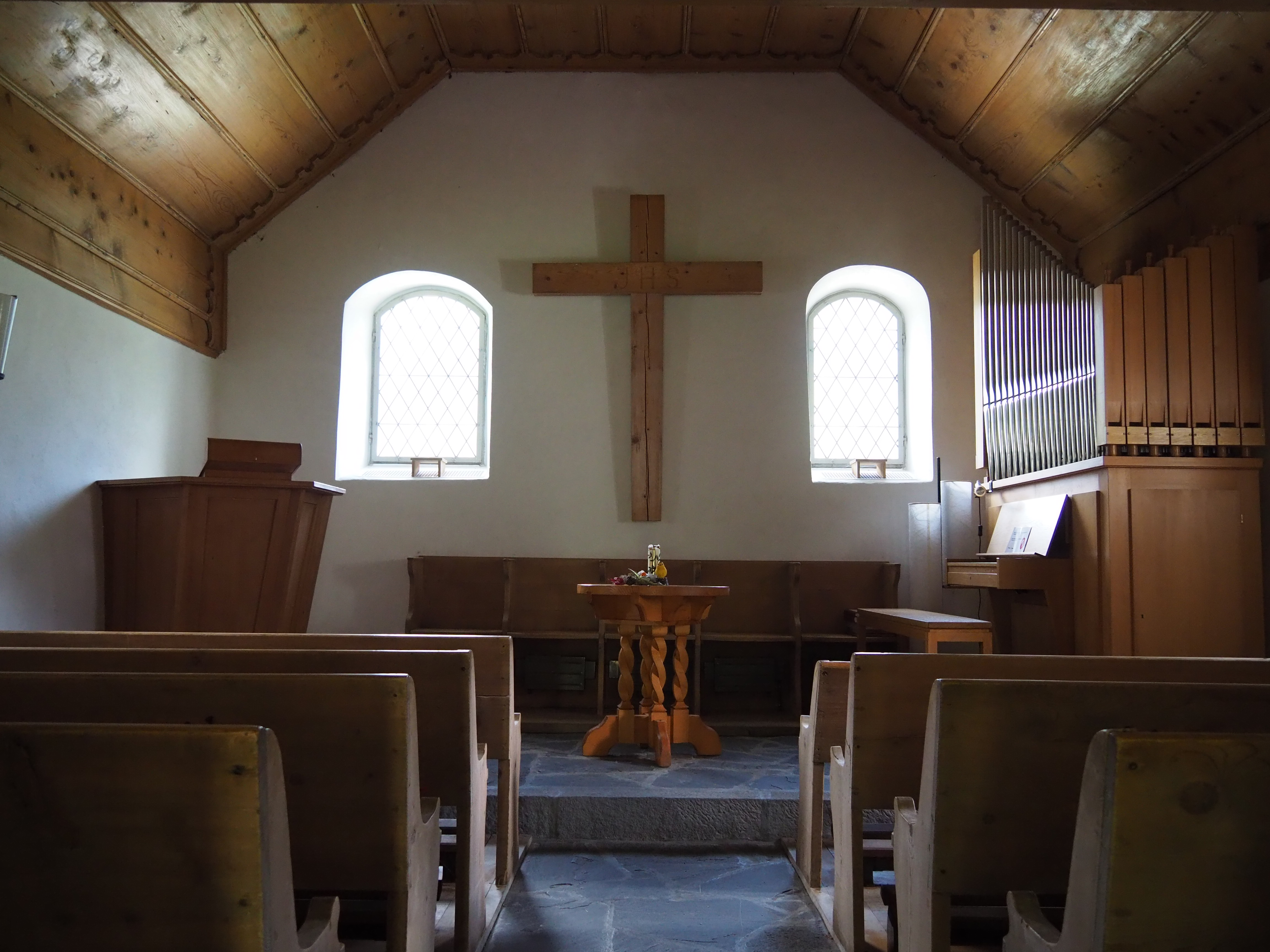 Kirche von 1612 in Abländschen, Gemeinde Saanen BE, Schweiz